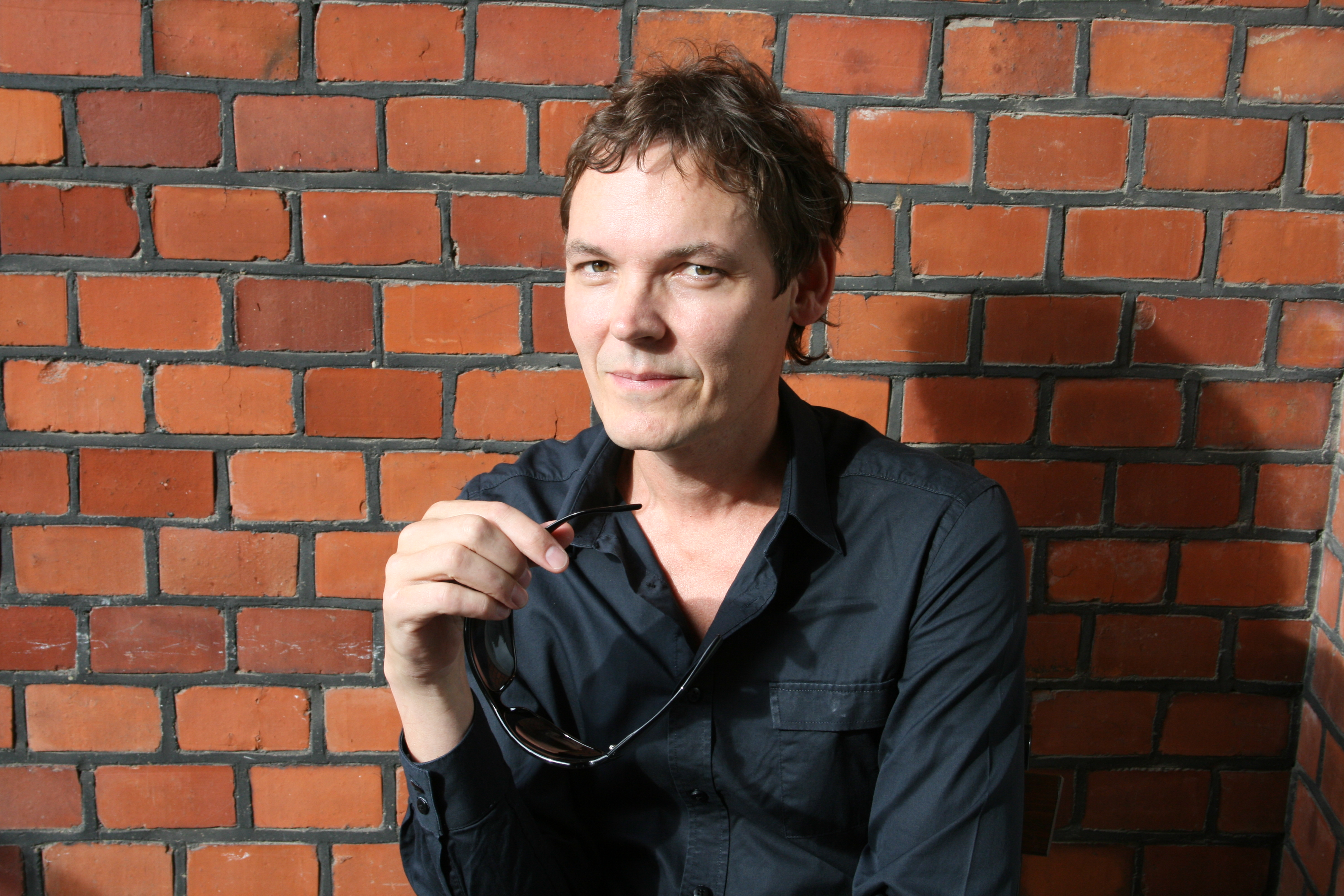 Bengt Liljegren